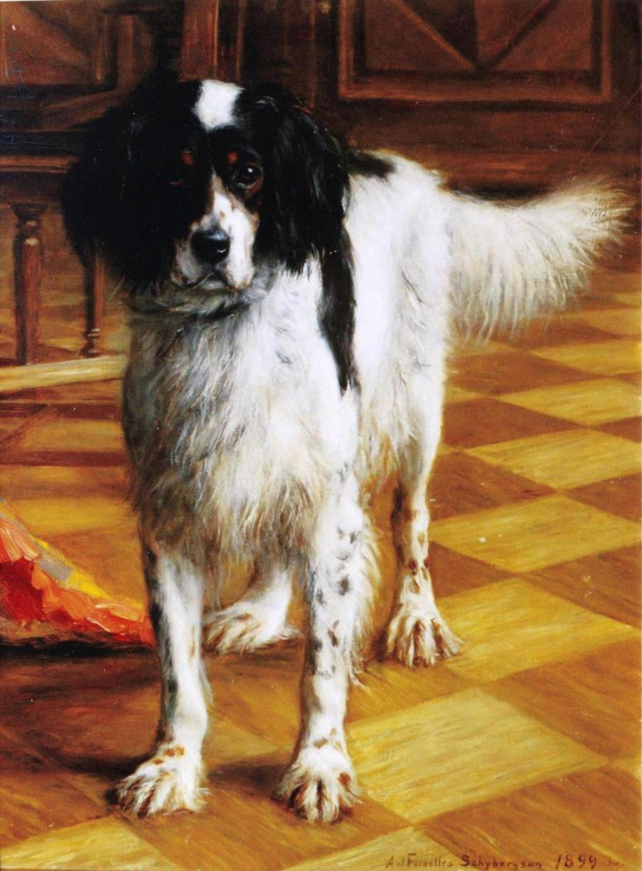 Anna af Forselles-Schybergsonin maalaus.